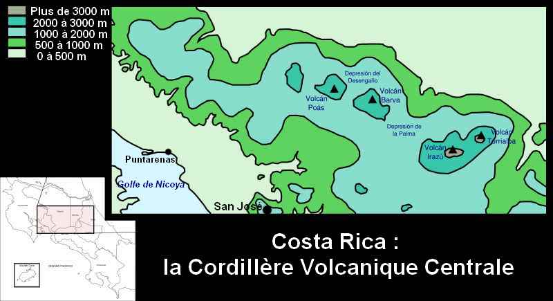 Carte extraite du fichier Mapa CR CVC.svg